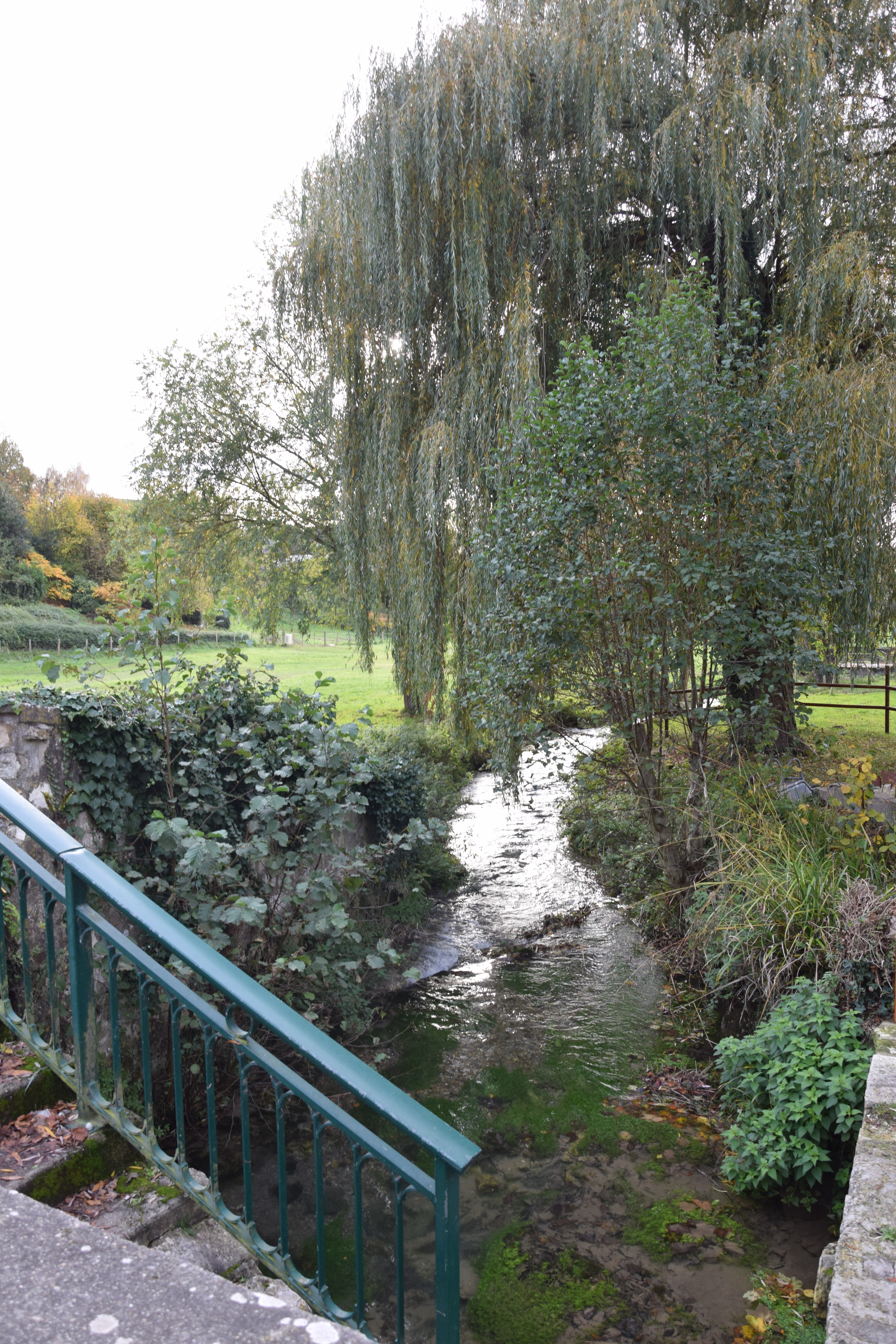 Saint-Wandrille-Rançon (Seine-Maritime, France)